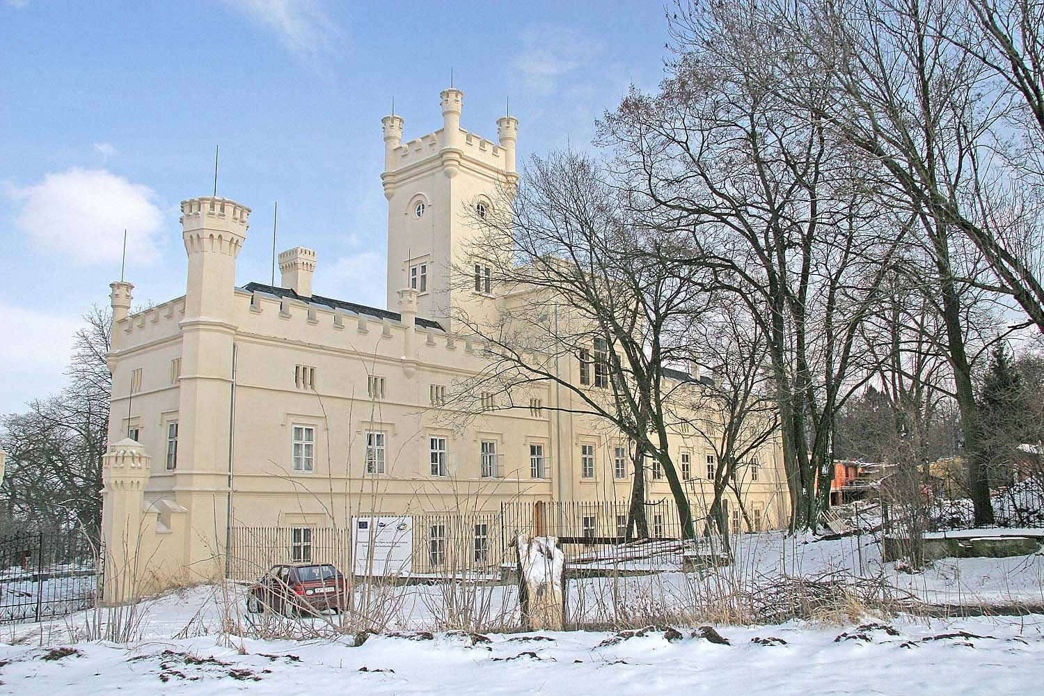 zámek Filipov u Čáslavi autor: Prazak date: 13. 3. 2006